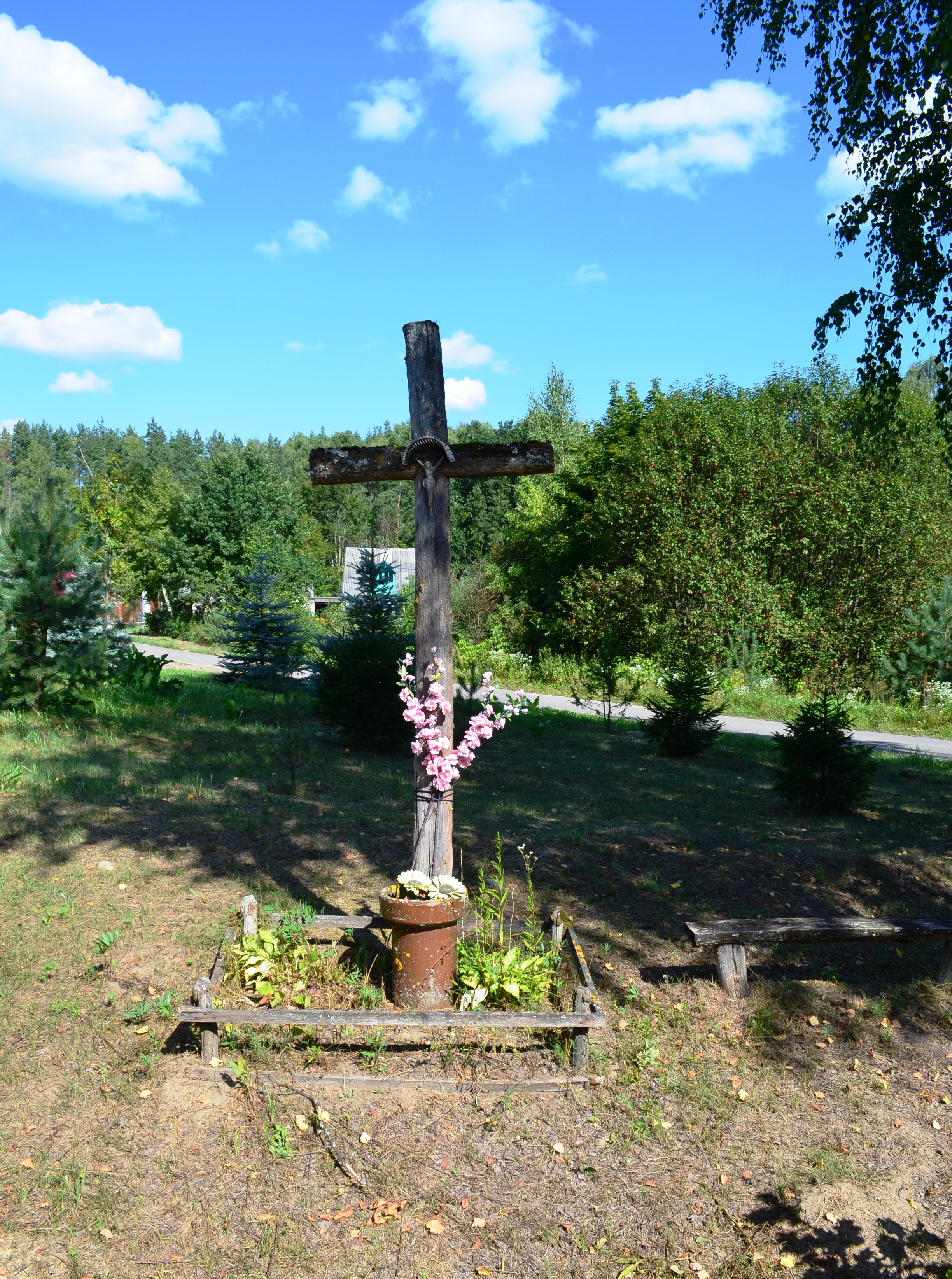 Kryžius Verkiuose, Vilnius